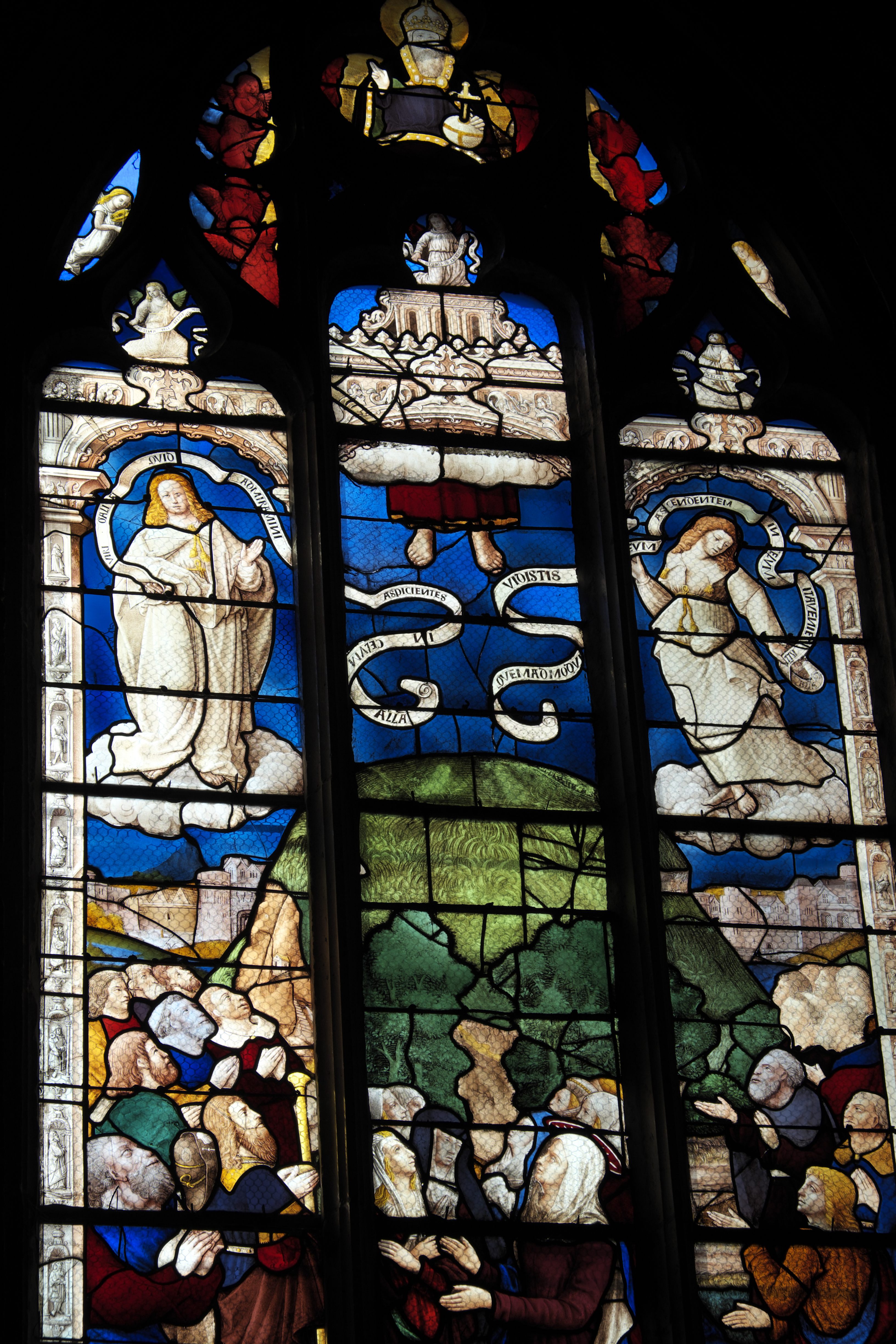 Katholische Kirche Saint-Pierre in Dreux im Département Eure-et-Loir (Centre-Val de Loire/Frankreich), Bleiglasfenster aus dem 16. Jahrhundert in der Philomenakapelle; Darstellung: Christi Himmelfahrt